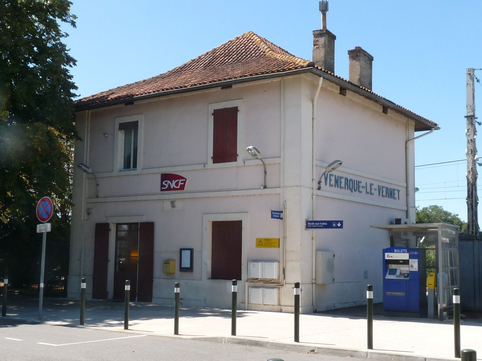 Gare du Vernet, Haute-Garonne, France